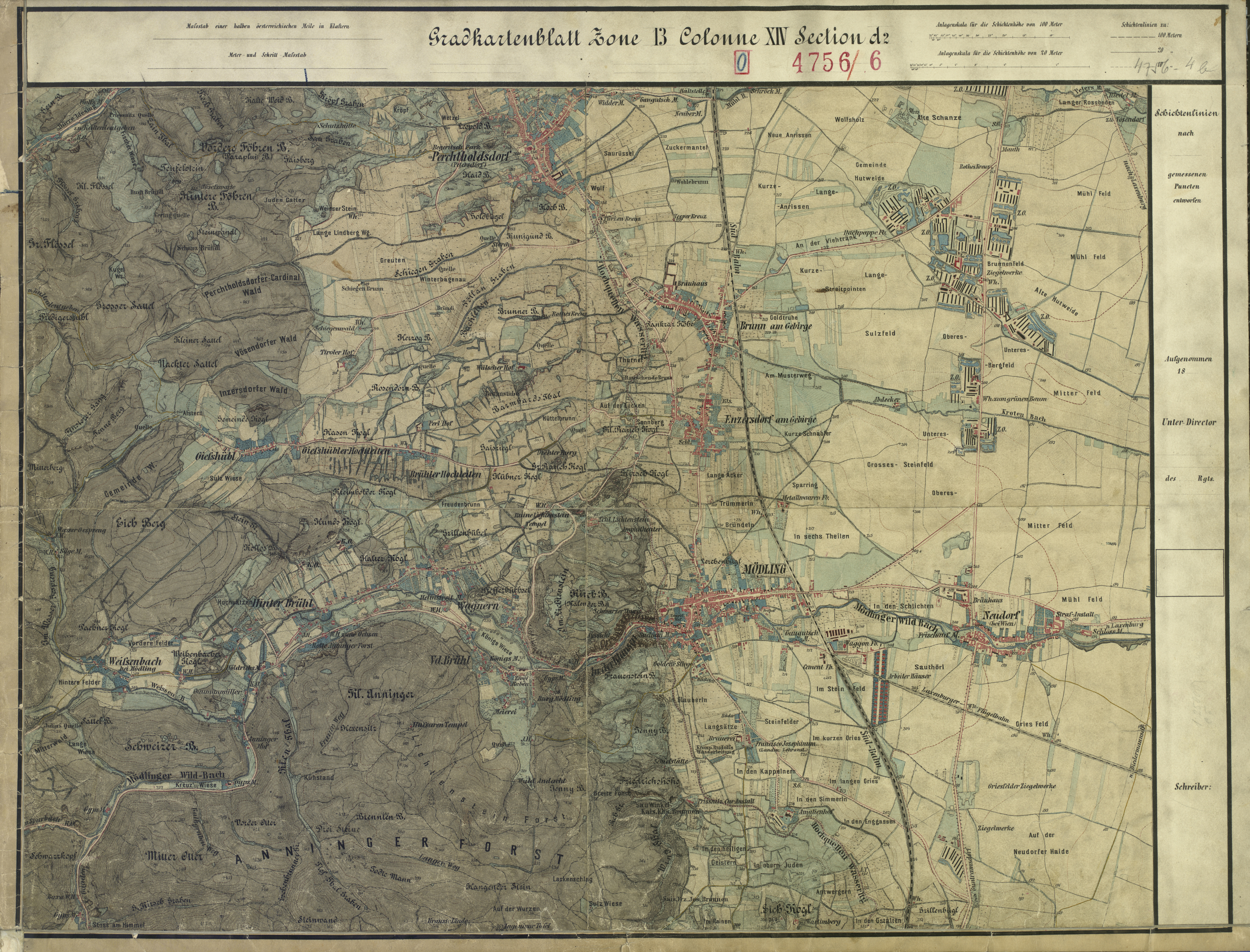 historische Landkarte: Gradkartenblatt Zone 13 Colonne XIV Section d2 (später 4756/4b). Mödling, Perchtoldsdorf. Franzisco-josephinische (3.) Landesaufnahme der österreichisch-ungarischen Monarchie. Aufnahmeblatt 1:12.500. Aufgenommen 1872